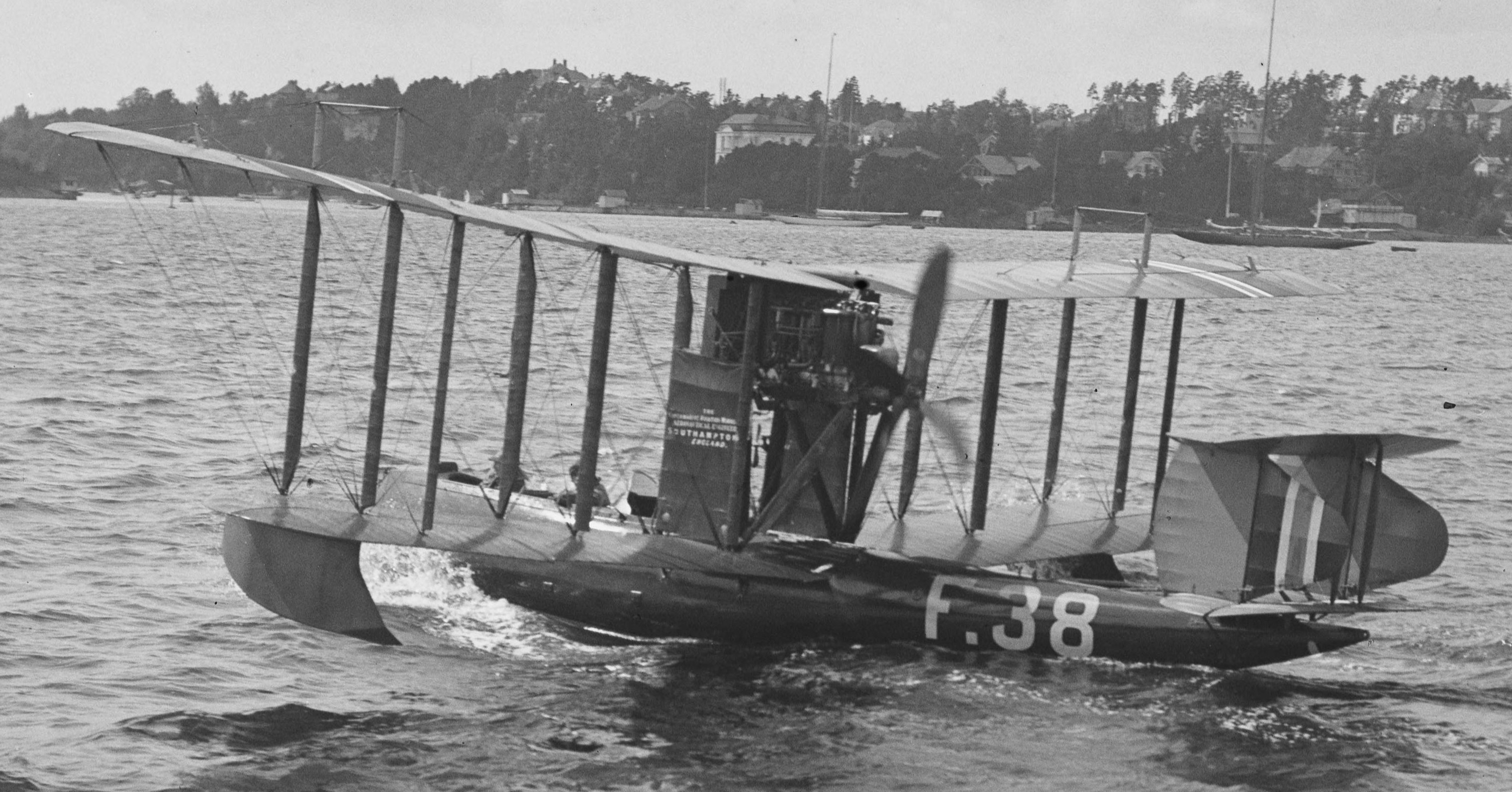 Bildet er hentet fra Nasjonalbibliotekets bildesamling. Anmerkninger til bildet var: Påskrift arkivark: Flyvepostbaaten. Supermarine Channel fra Det norske luftfartsrederi, senere overtatt av Marinens flyvåpen. Arkivnummer: 370 Oslo, Oslo, Oslo